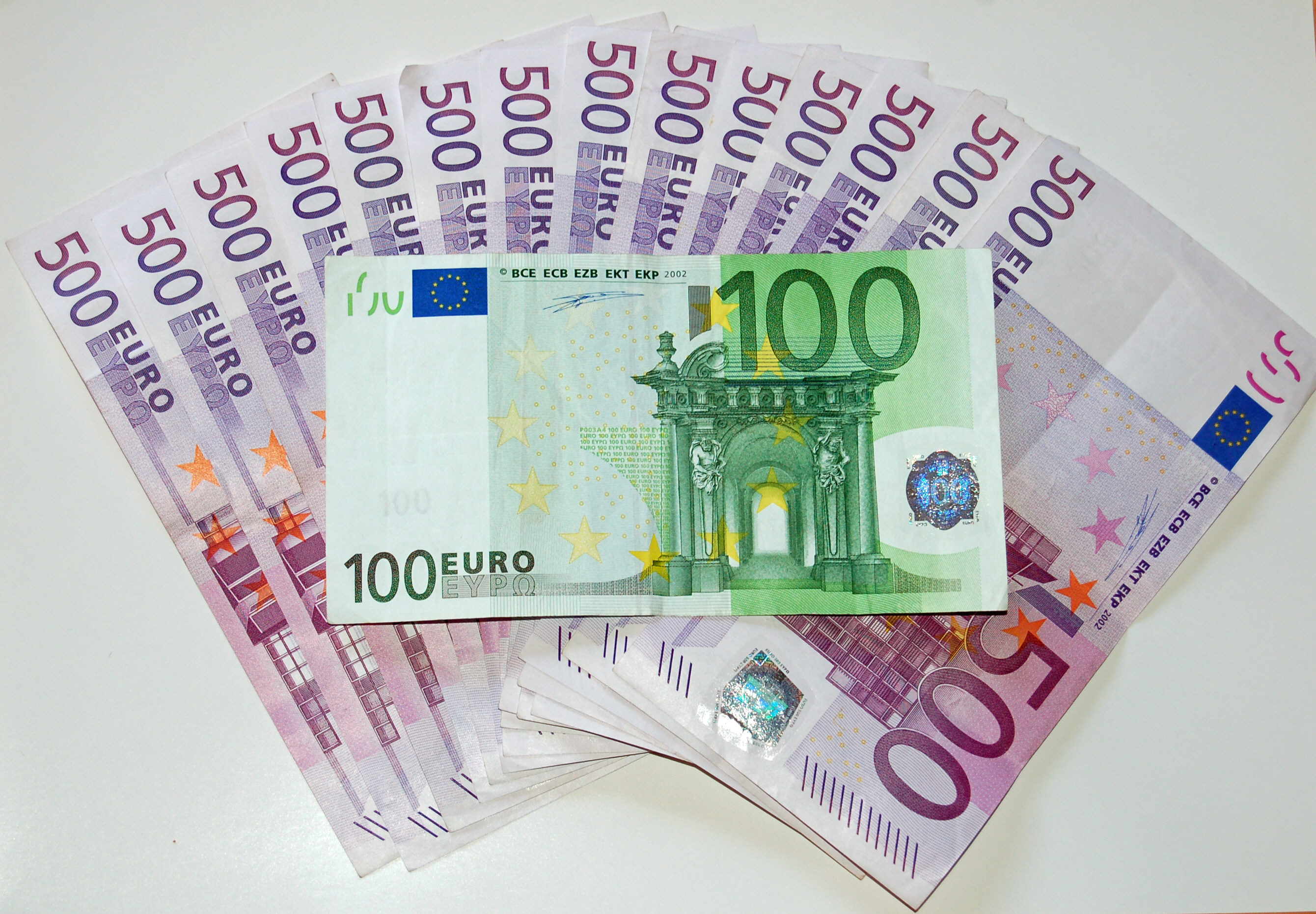 14 500 Euro-Scheine mit einem 100 Euro Schein auf einem Din A 4 Blatt